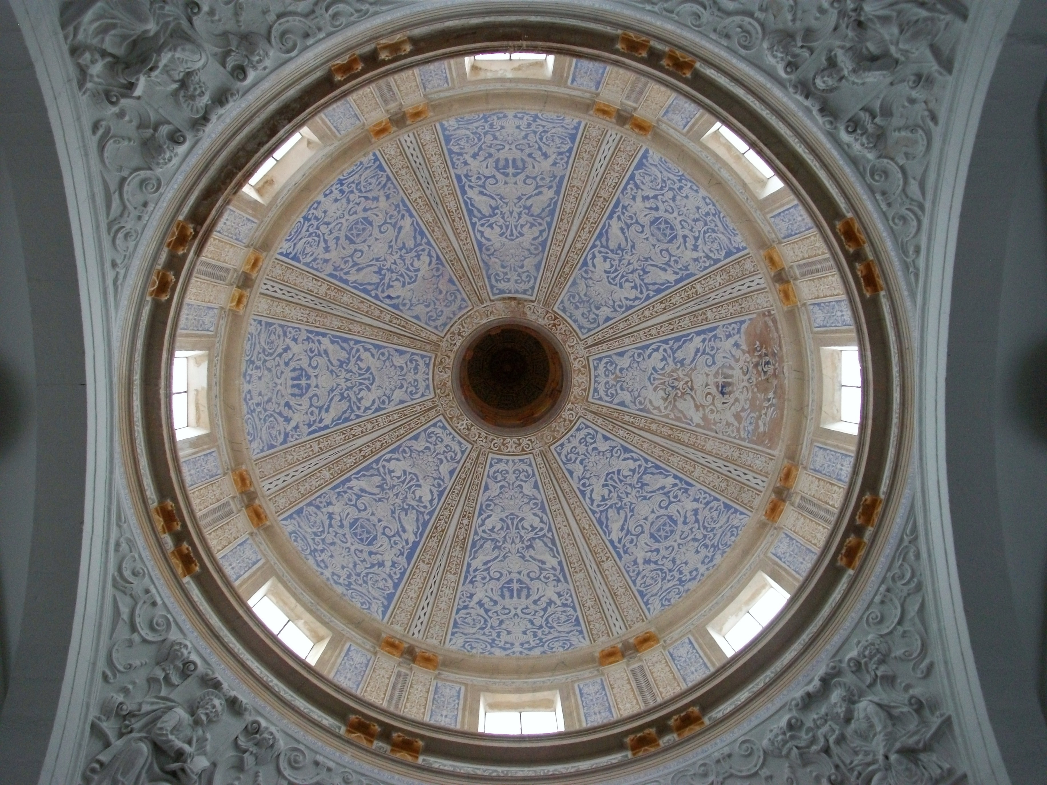 Interior de la cúpula de la cartoixa d'Ara Christi, el Puig, País Valencià.